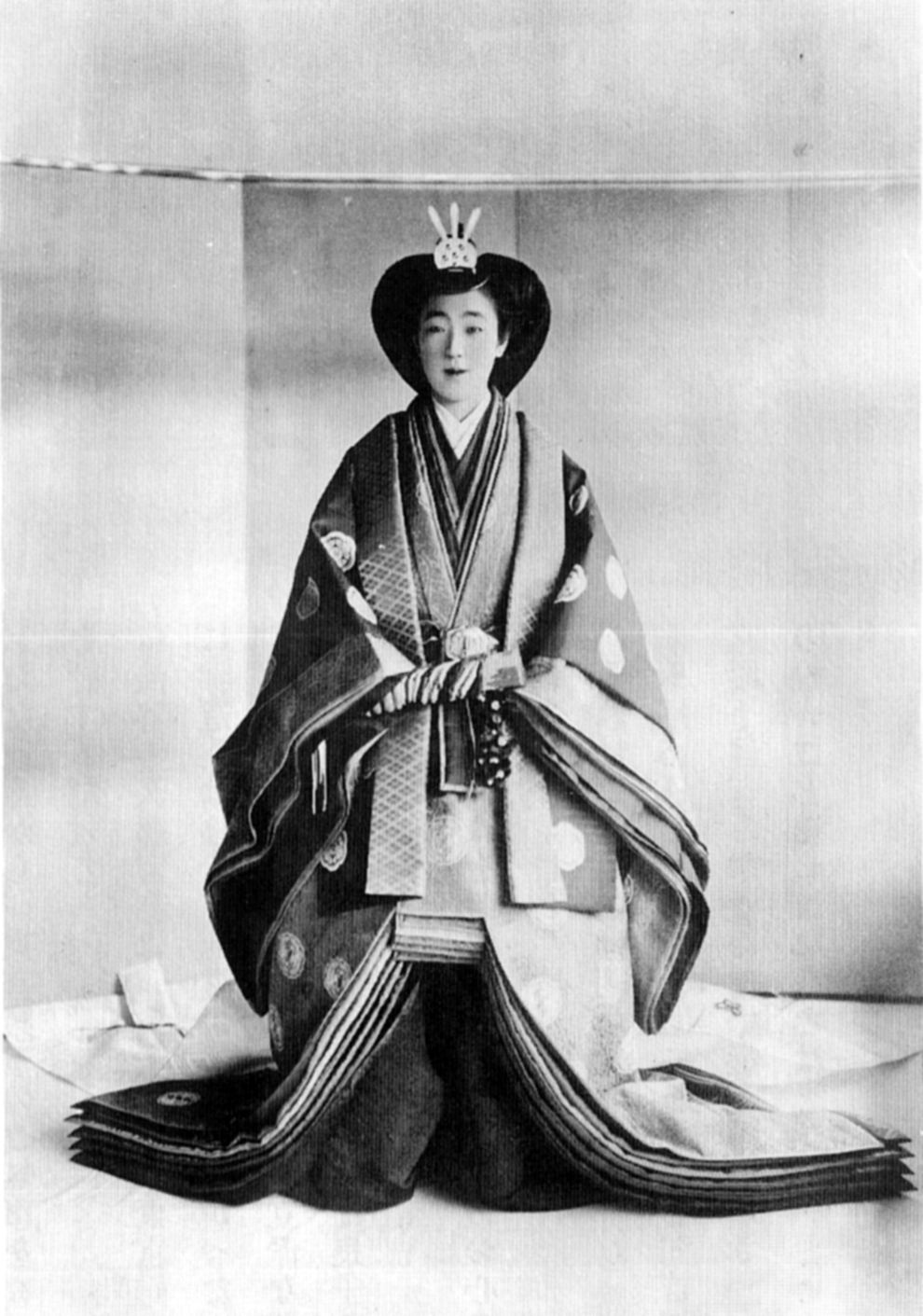 結婚時の良子女王（後の香淳皇后 Ngako/Empress Kōjun）